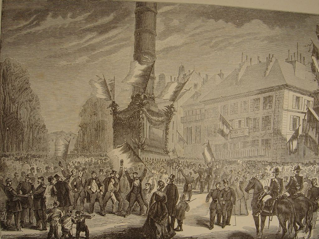 la place de la Bastille "on criait" "à Berlin"